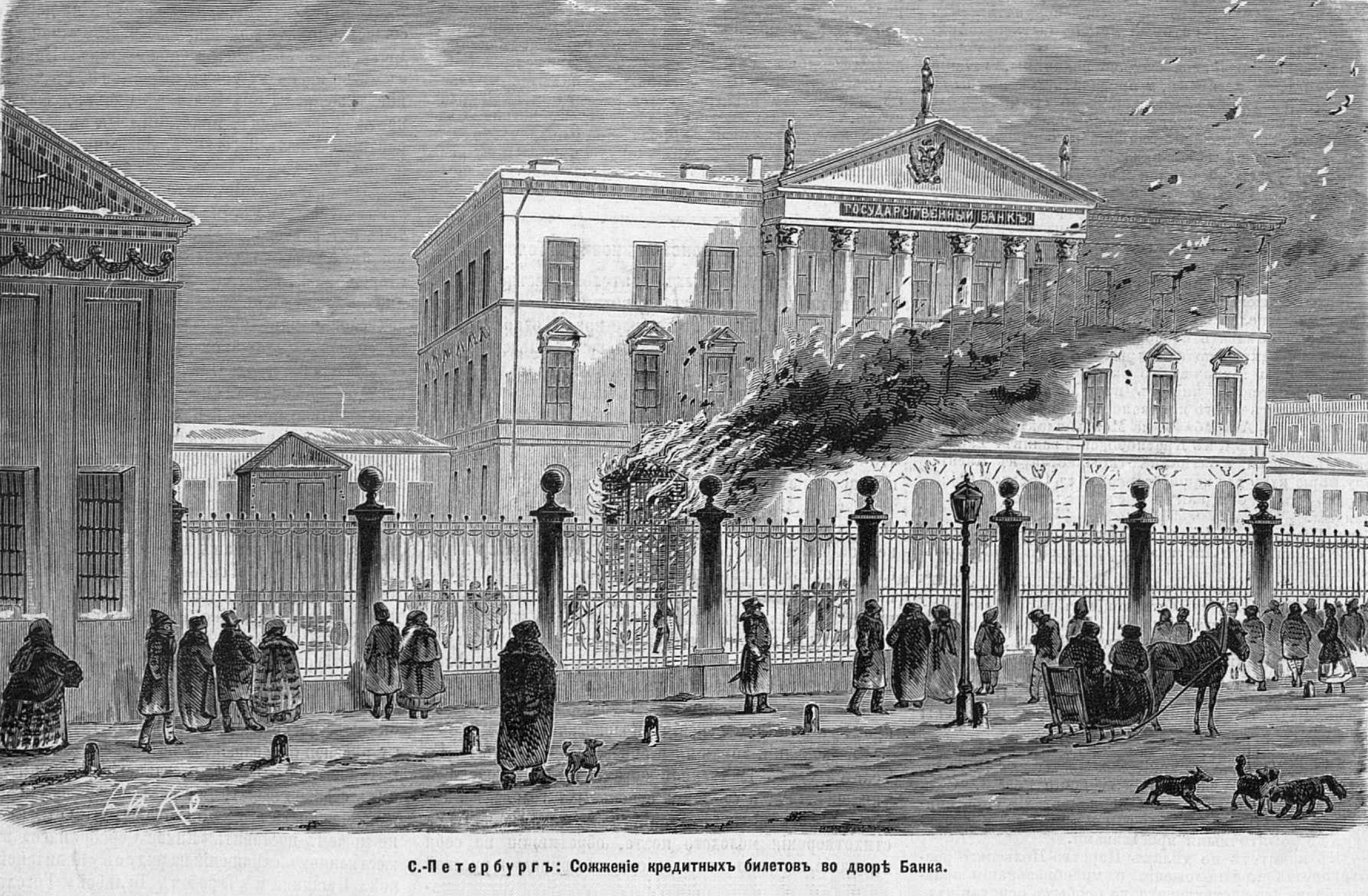 Сожжение кредитных билетов во дворе Государственного банка Российской империи, 1870 год